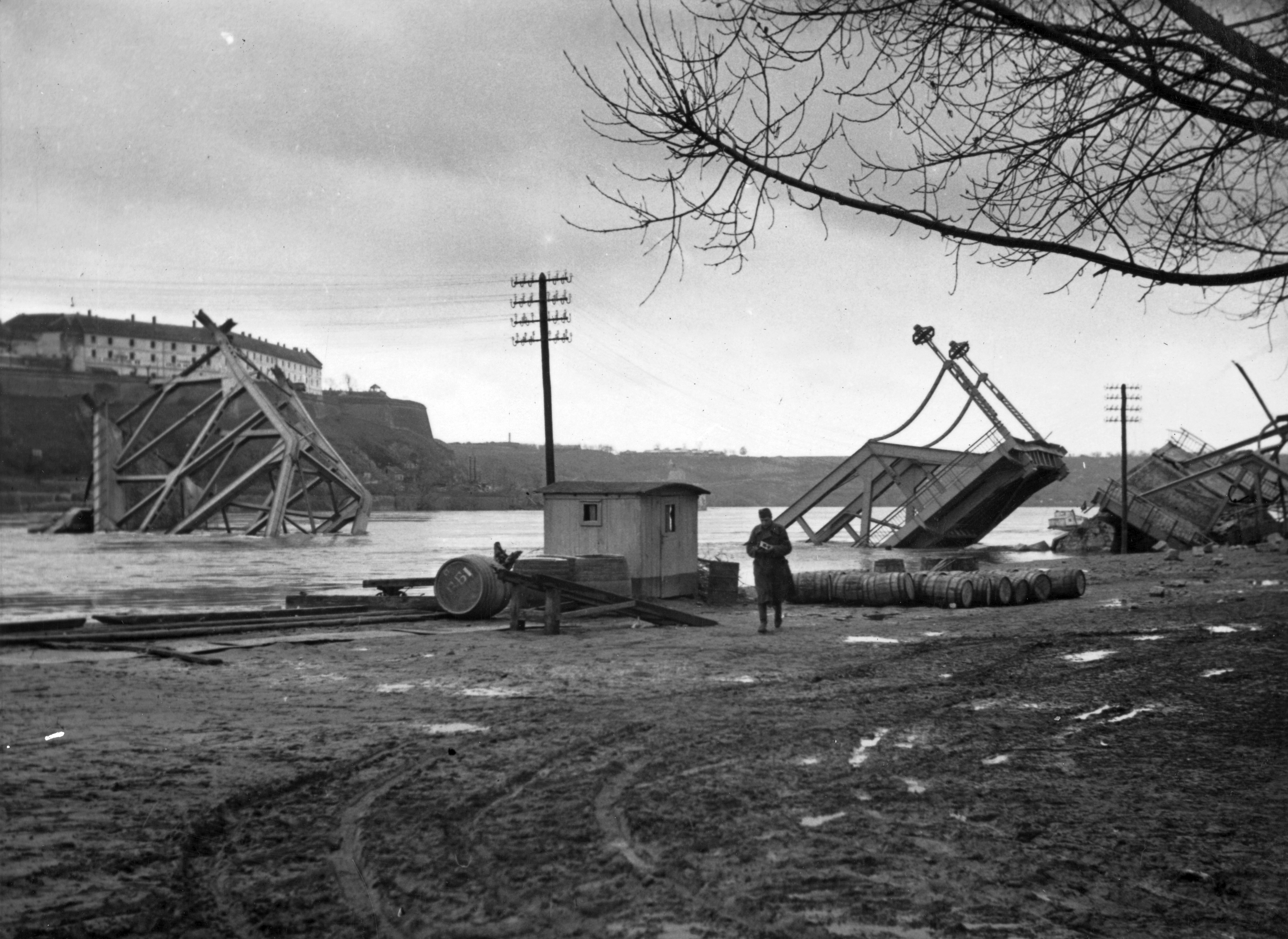 A szerbek áltak felrobbantott újvidéki közúti híd maradványa, háttérben Pétervárad. Location: Serbia, Novi Sad Tags: second World War, wrecked bridge Title: A szerbek áltak felrobbantott újvidéki közúti híd maradványa, háttérben Pétervárad.